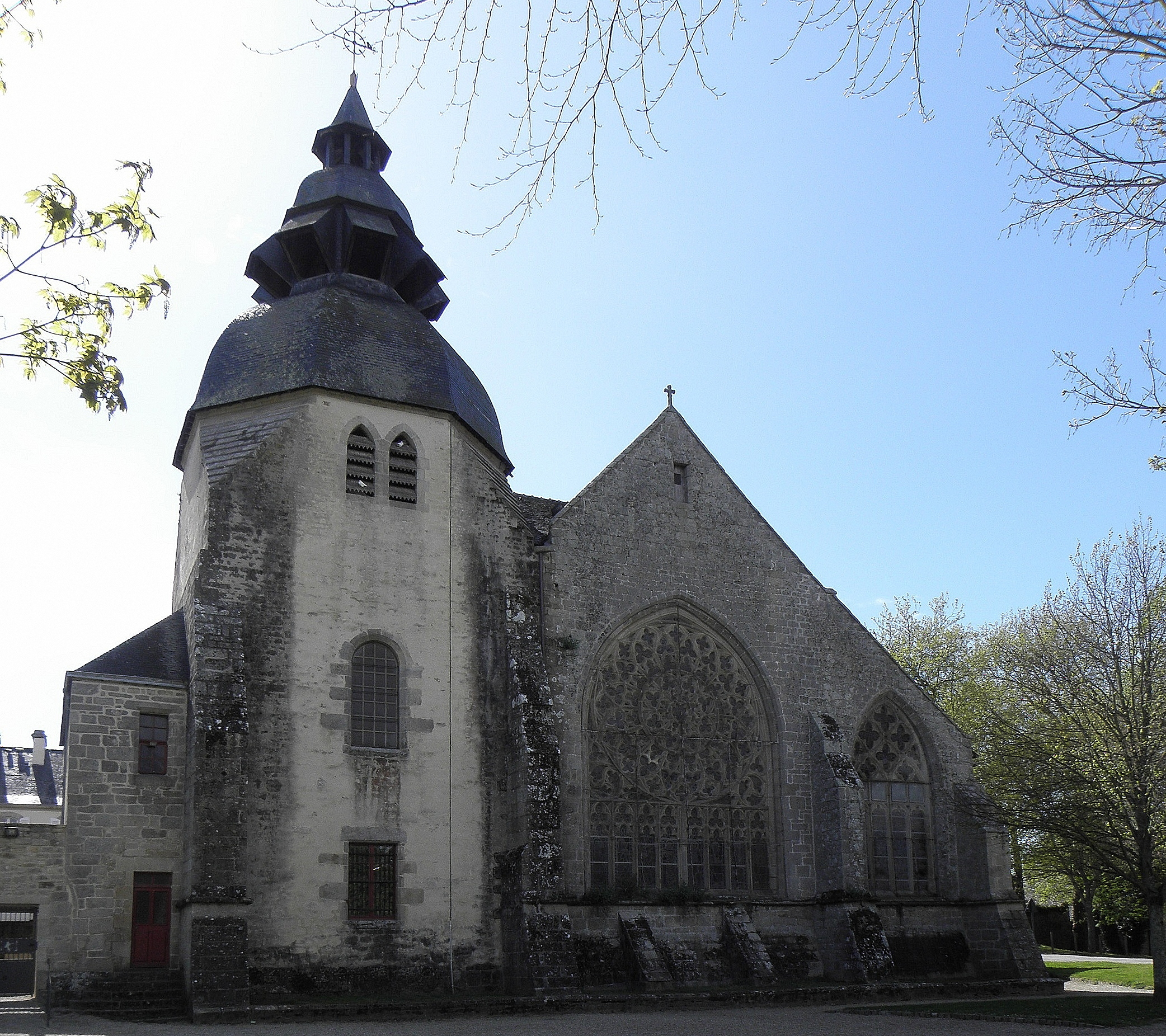 Clocher et chevet de l'église Notre-Dame-des-Carmes de Pont-l'Abbé (29). .